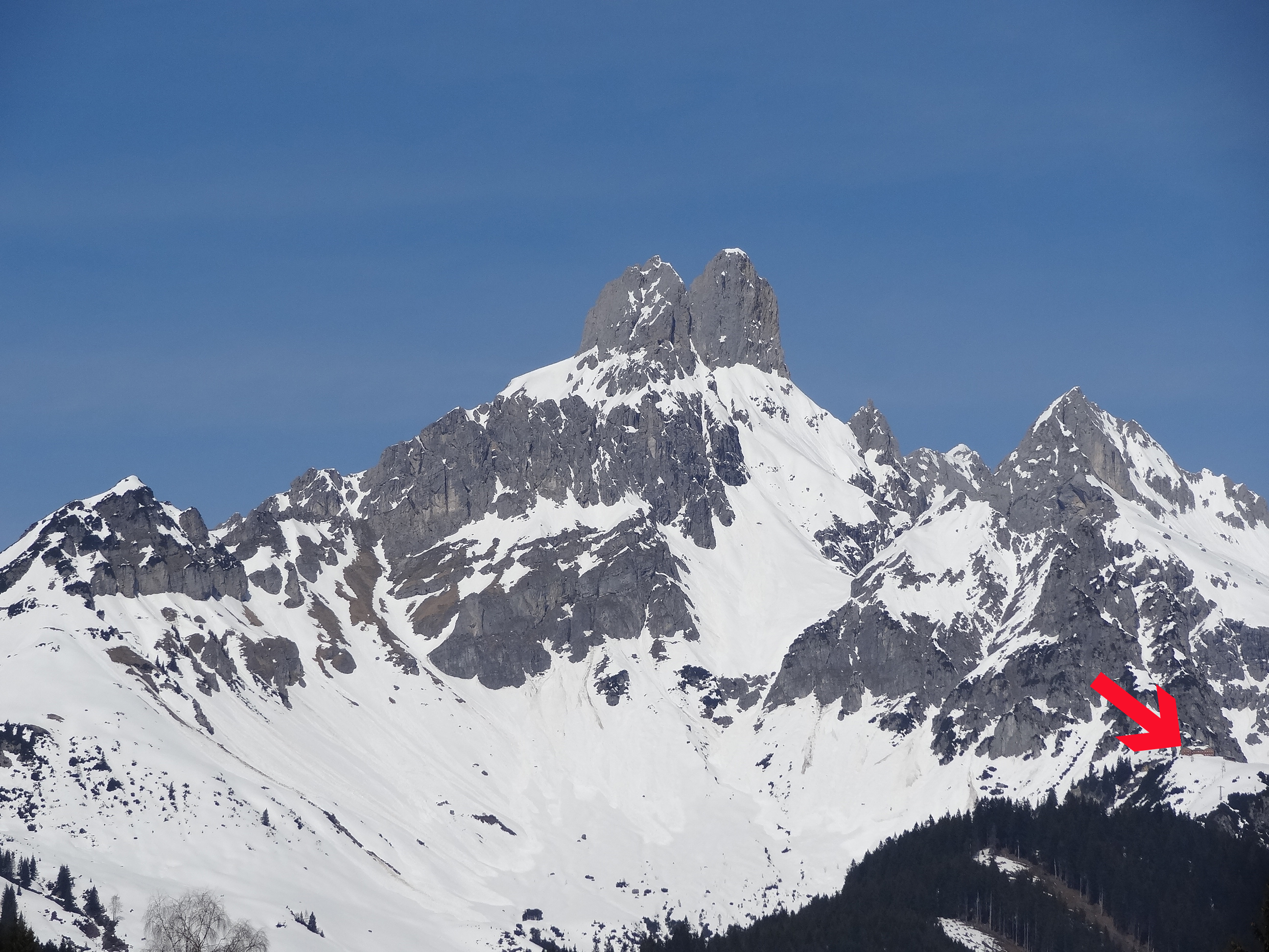 Leckkogel, Kampel, Kampelbrunnspitze, Bischofsmütze, Schwingerzipf, Mosermandl, Armkarwand